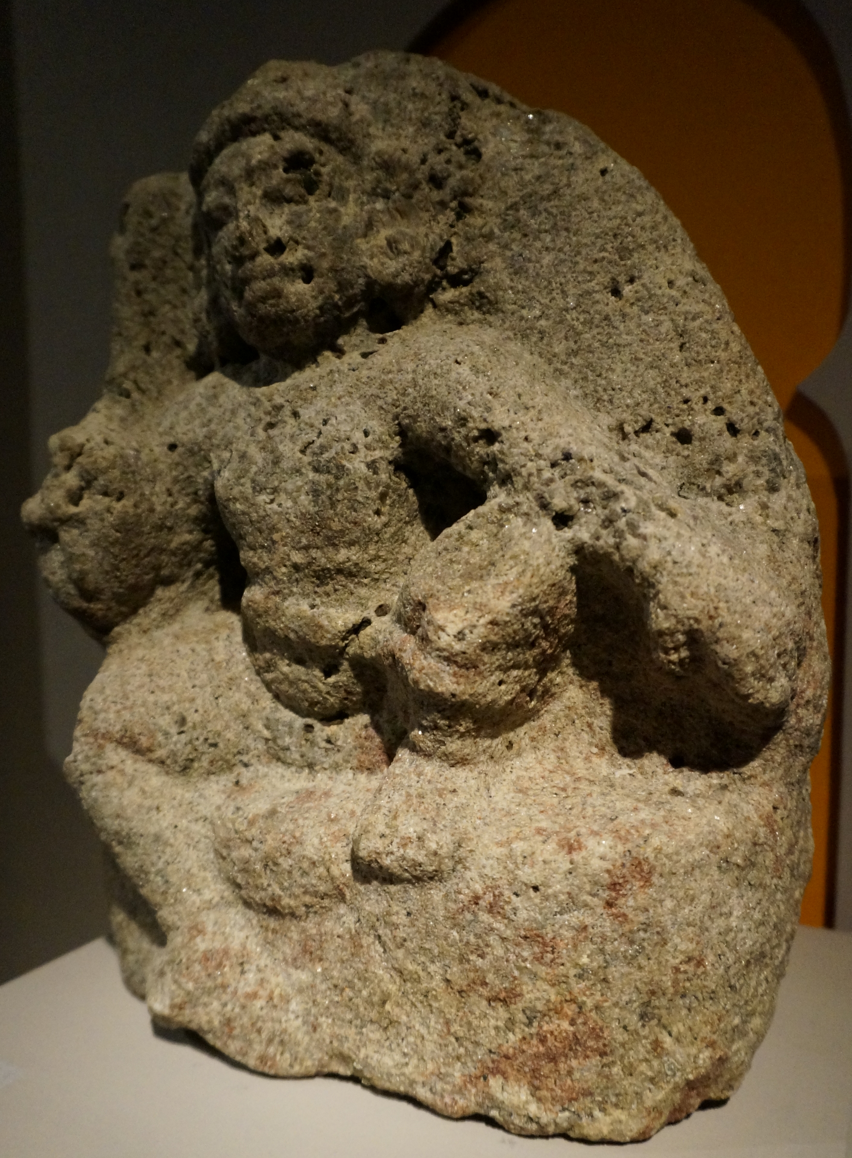 Vue de Aiyanar . Sculpture du 15 ou 17e siècle.